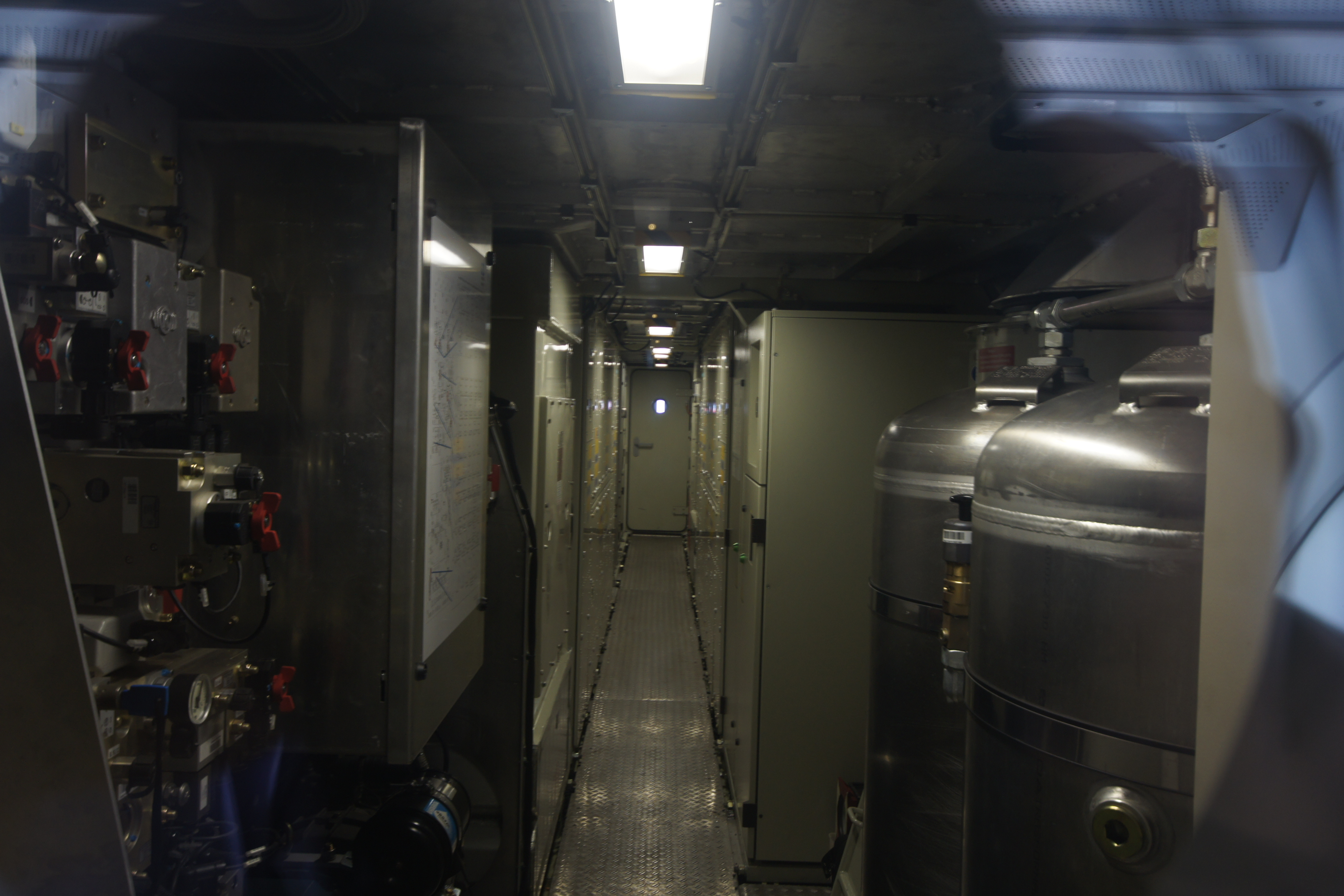 Przedział maszynowy w elektrowozie EU44 "Husarz" - widok prze szybkę z kabiny sterowniczej